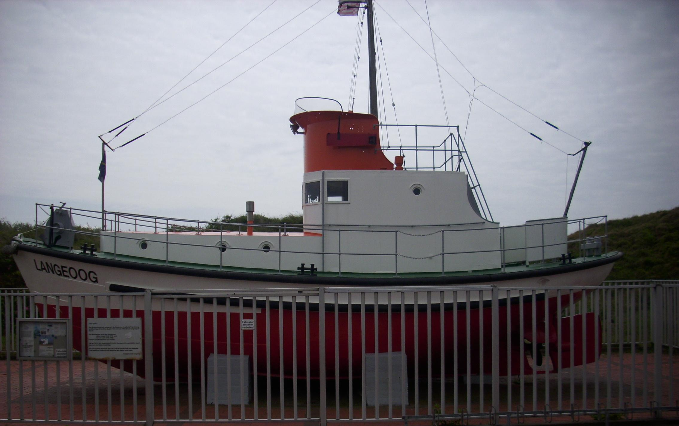 Motorrettungsboot Langeoog der DGzRS im Inseldorf auf Langeoog